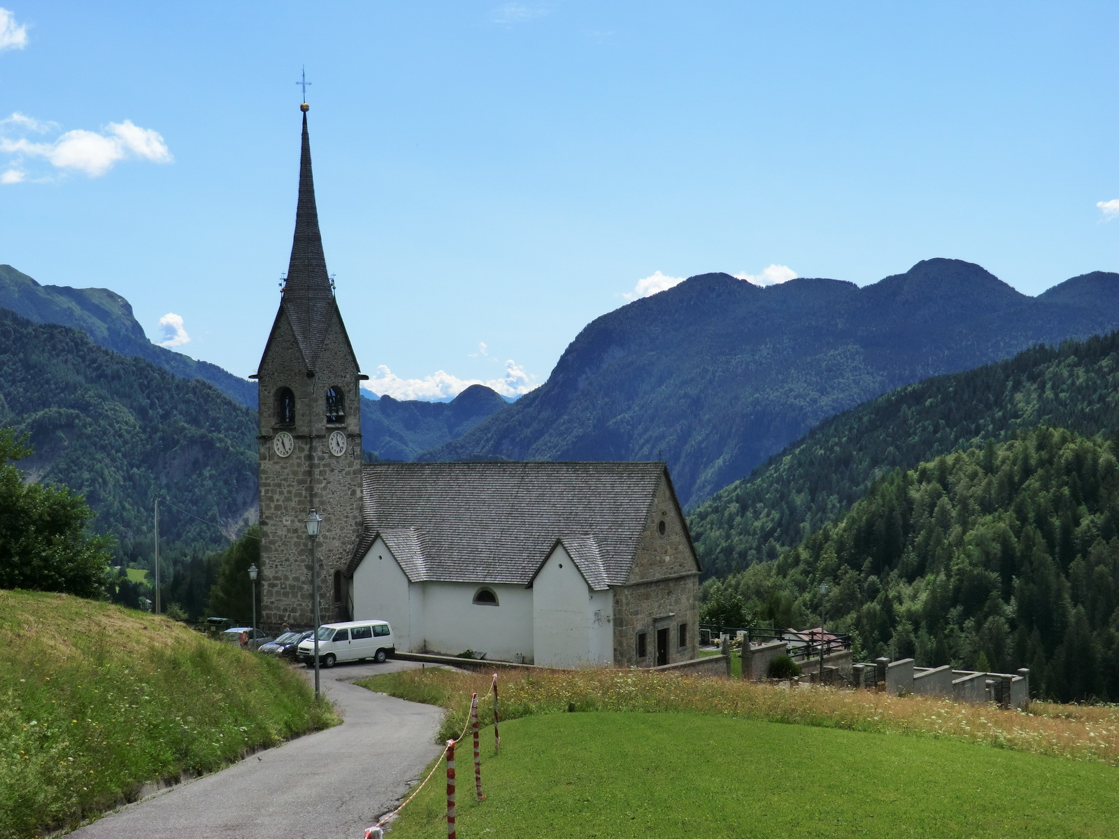 Church of Saint Lawrence Native nameChiesa di San LorenzoLocationSauris di Sopra, Friuli-Venezia Giulia, ItalyCoordinates46° 28′ 02.66″ N, 12° 41′ 17.25″ E